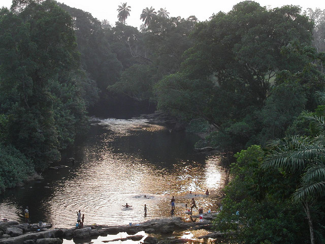 Река Кросс (Маньо, Ойоно) около города Мамфе (Камерун).